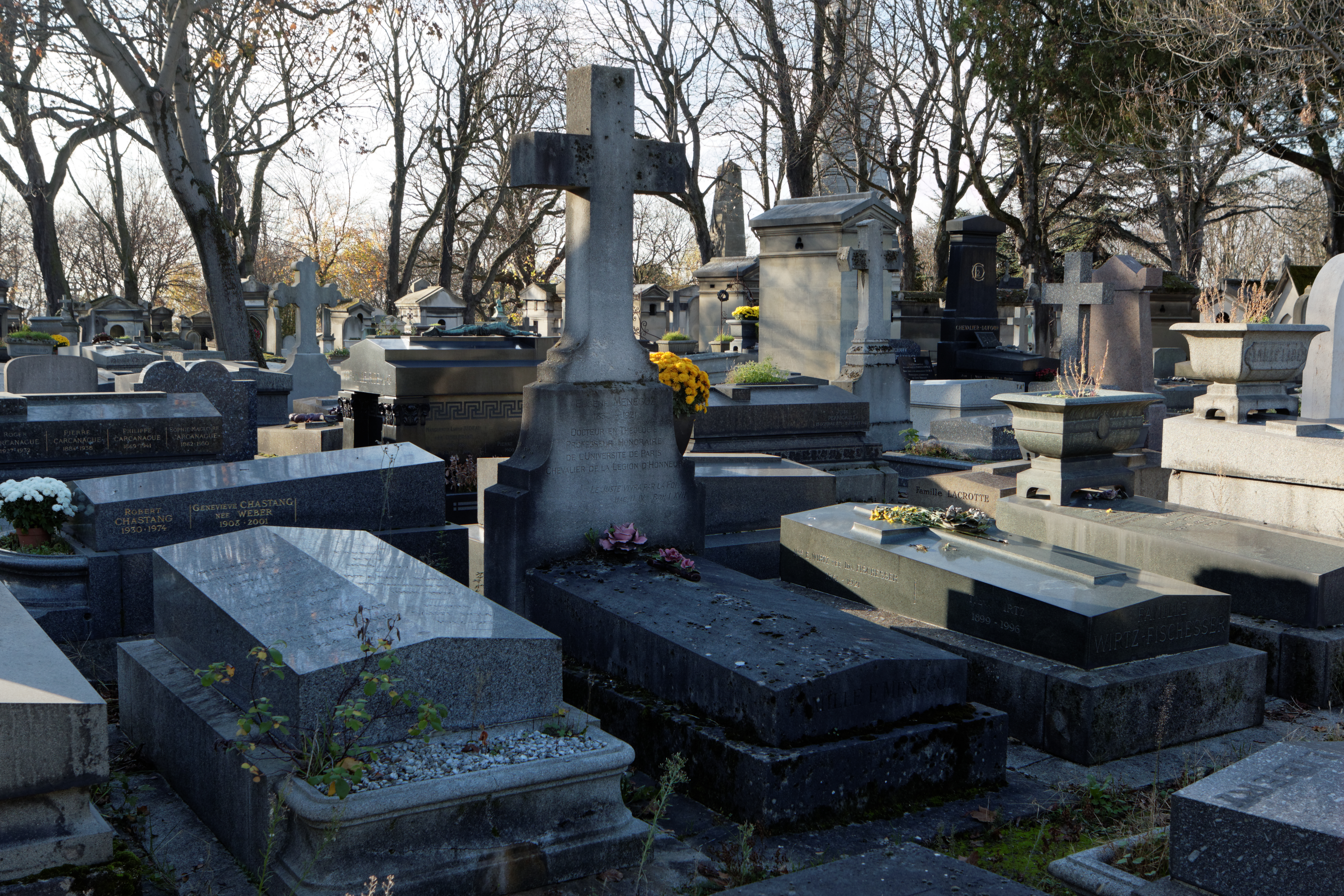 Sépulture d'Eugène Ménégoz (1838-1921), pasteur luthérien français et le fondateur du symbolo-fidéisme, une tendance théologique protestante libérale qui met en valeur l'attachement au symbolique et à la foi en Dieu plutôt que l'attachement à des dogmes.